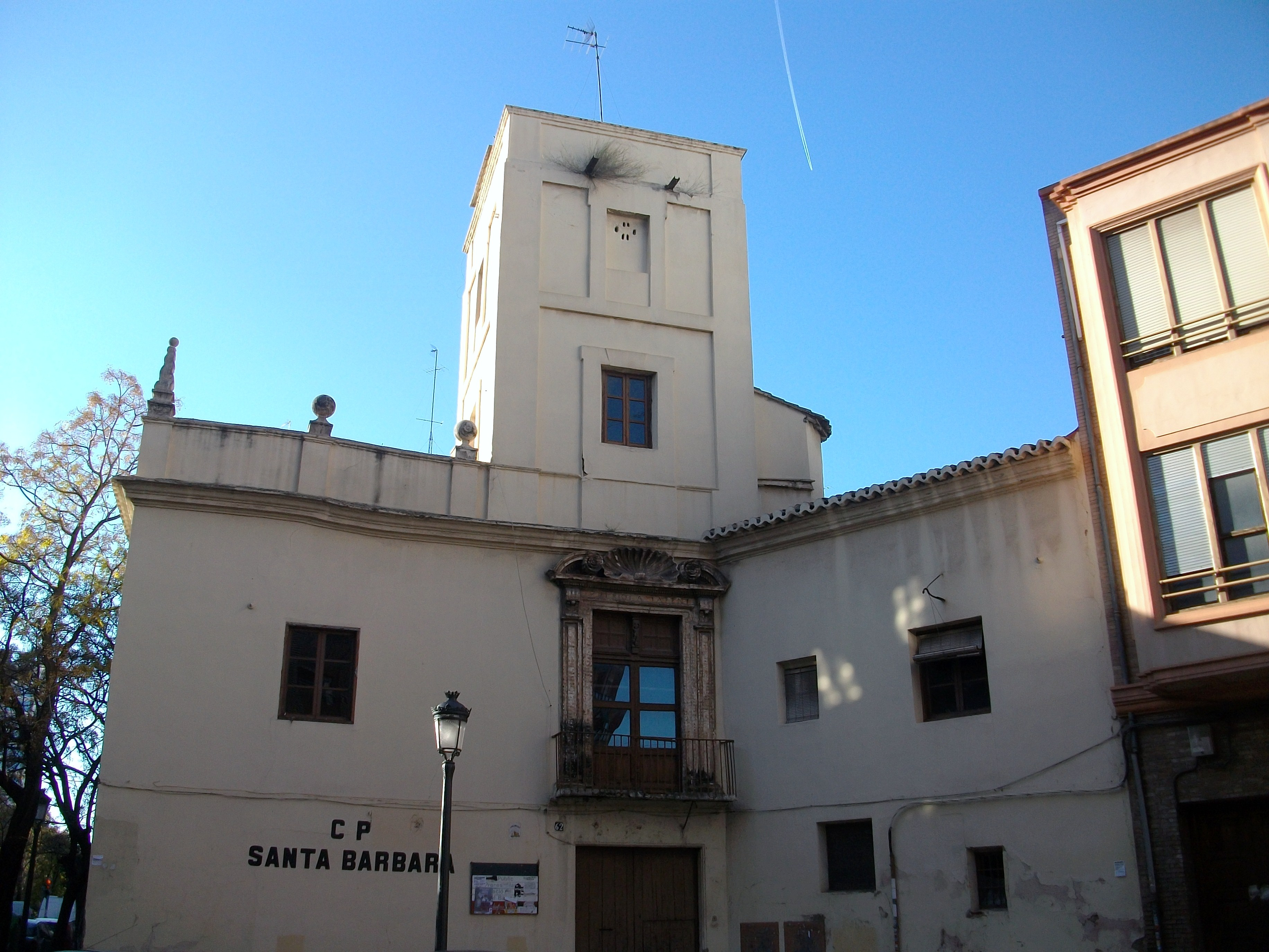 Alqueria de Julià de València.